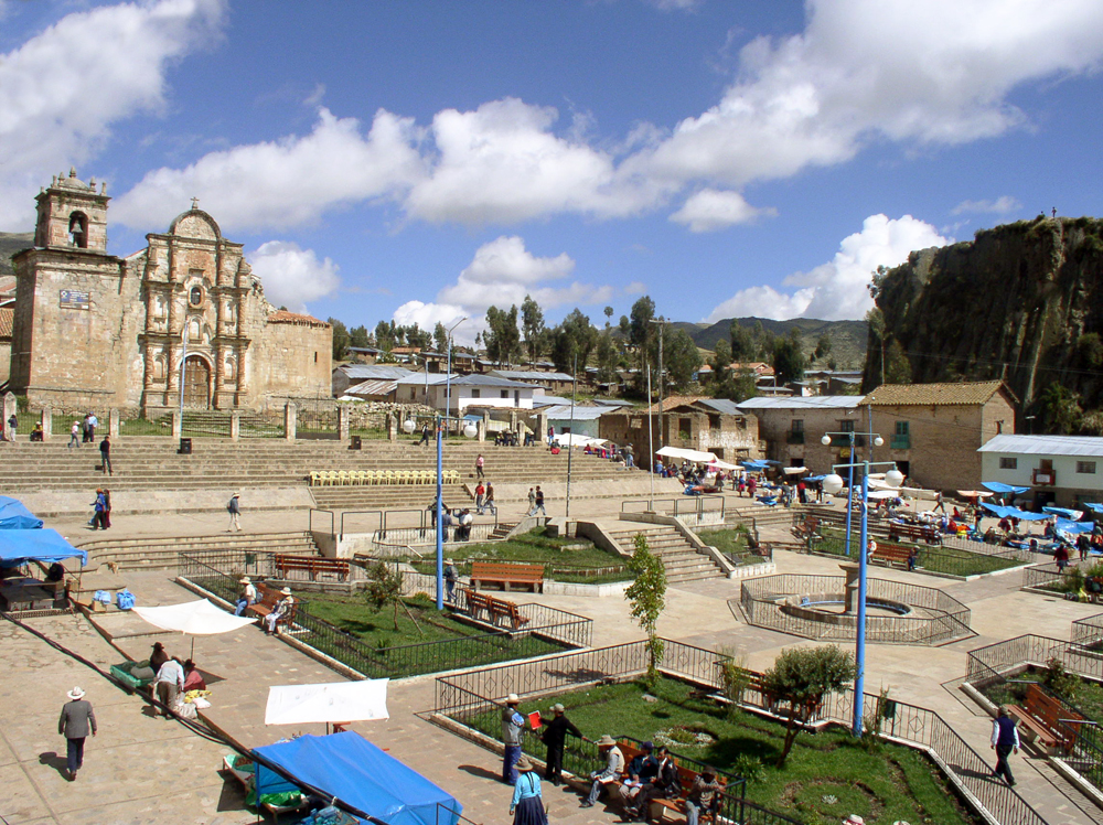 imagen de la Plaza de Haquira